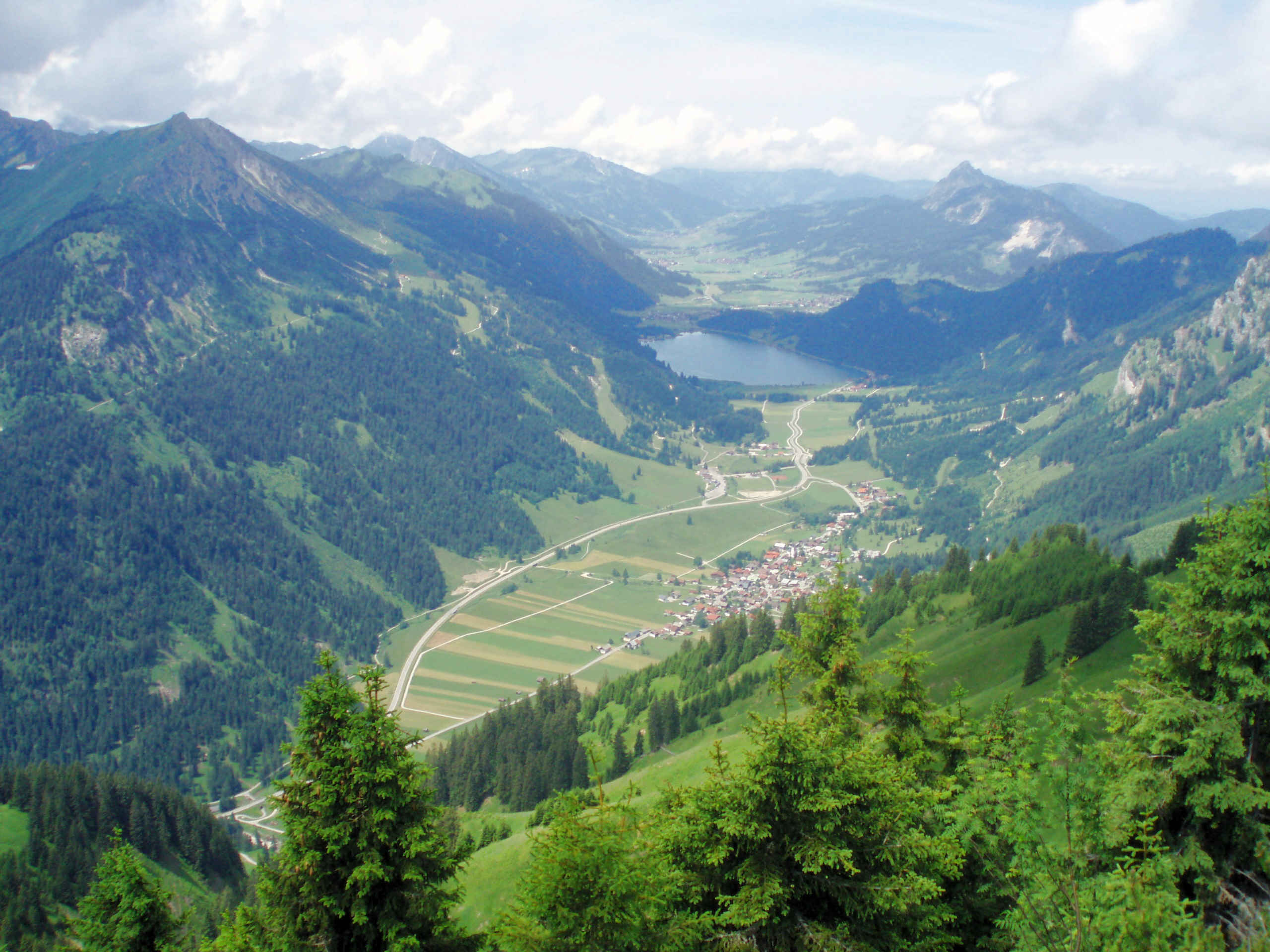 Blick vom Hahnekamm auf Nesselwängle